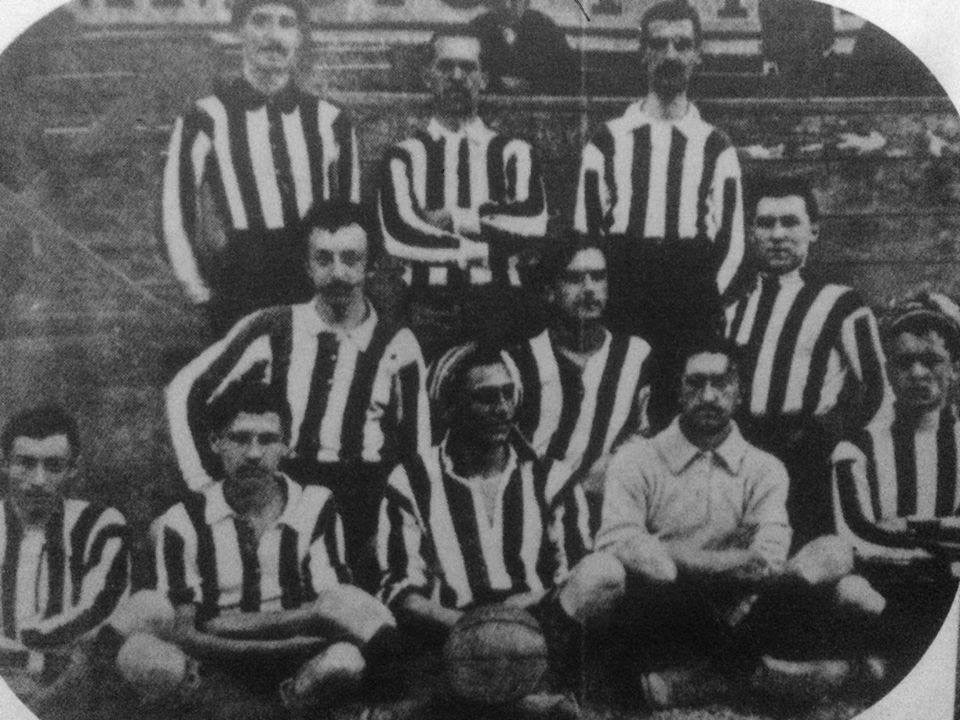 Una formazione della Juventus nella stagione 1908-09.